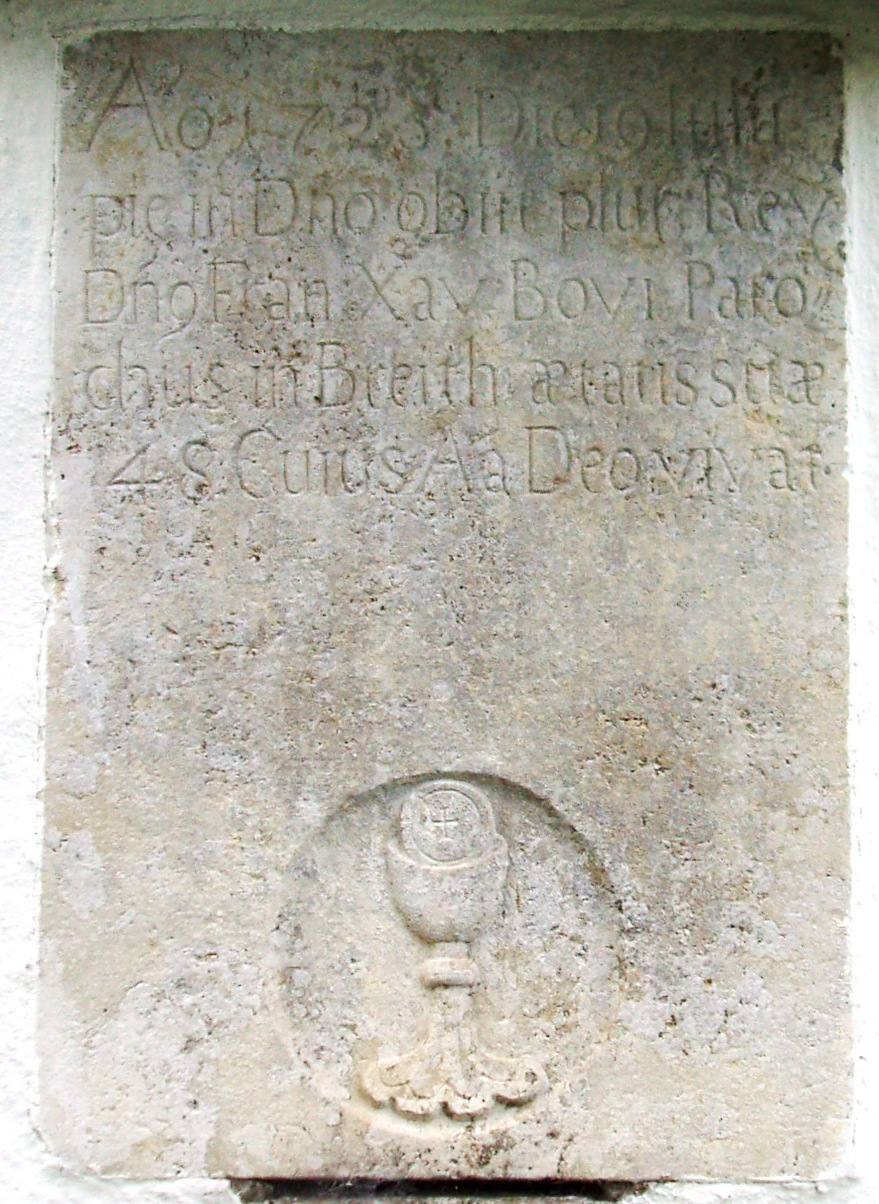 Franz_Xaver_Bovius_Grabstein_in_Preith_im_Landkreis_Eichstätt